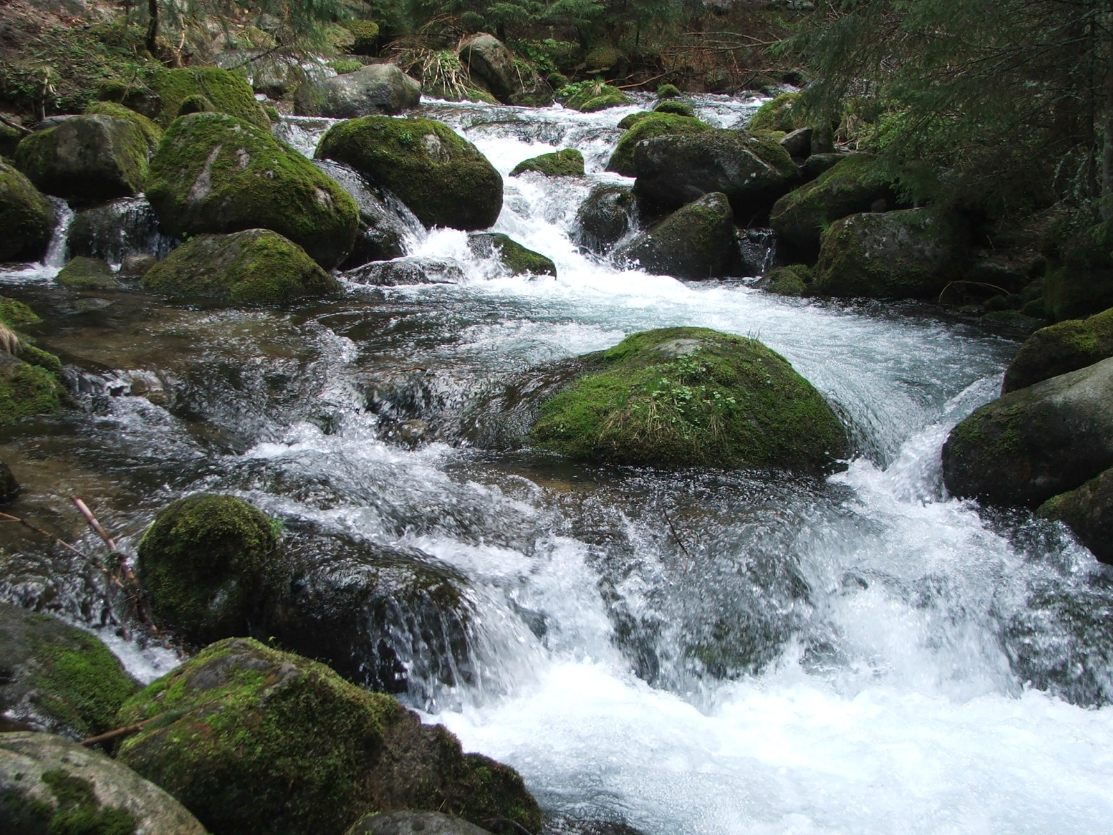 Starorobociański Potok